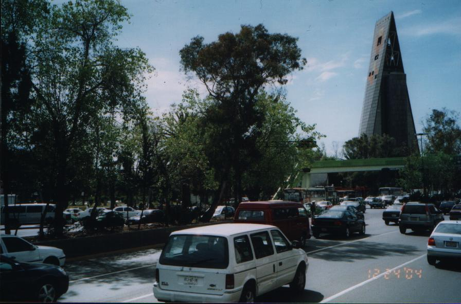 Avenida Insurgentes Mexico City